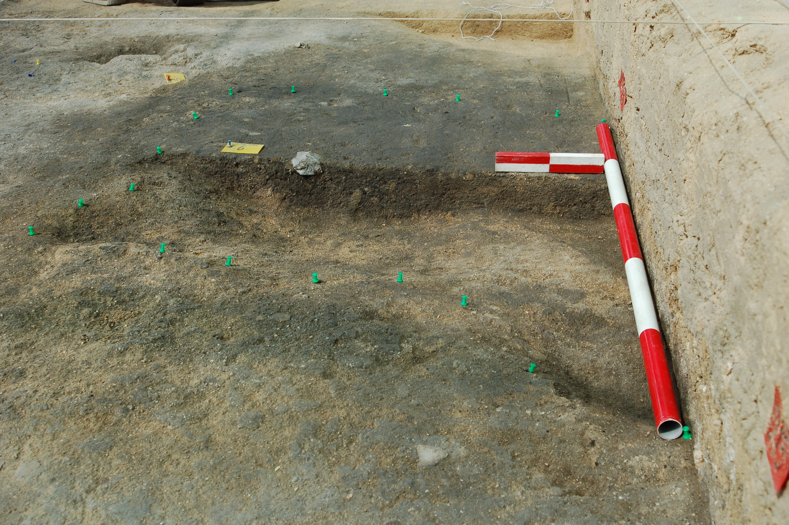 Foto de la excavación del yacimiento epipaleolítico del Parque Darwin, Madrid (España). Se aprecia una pastilla de fuego.